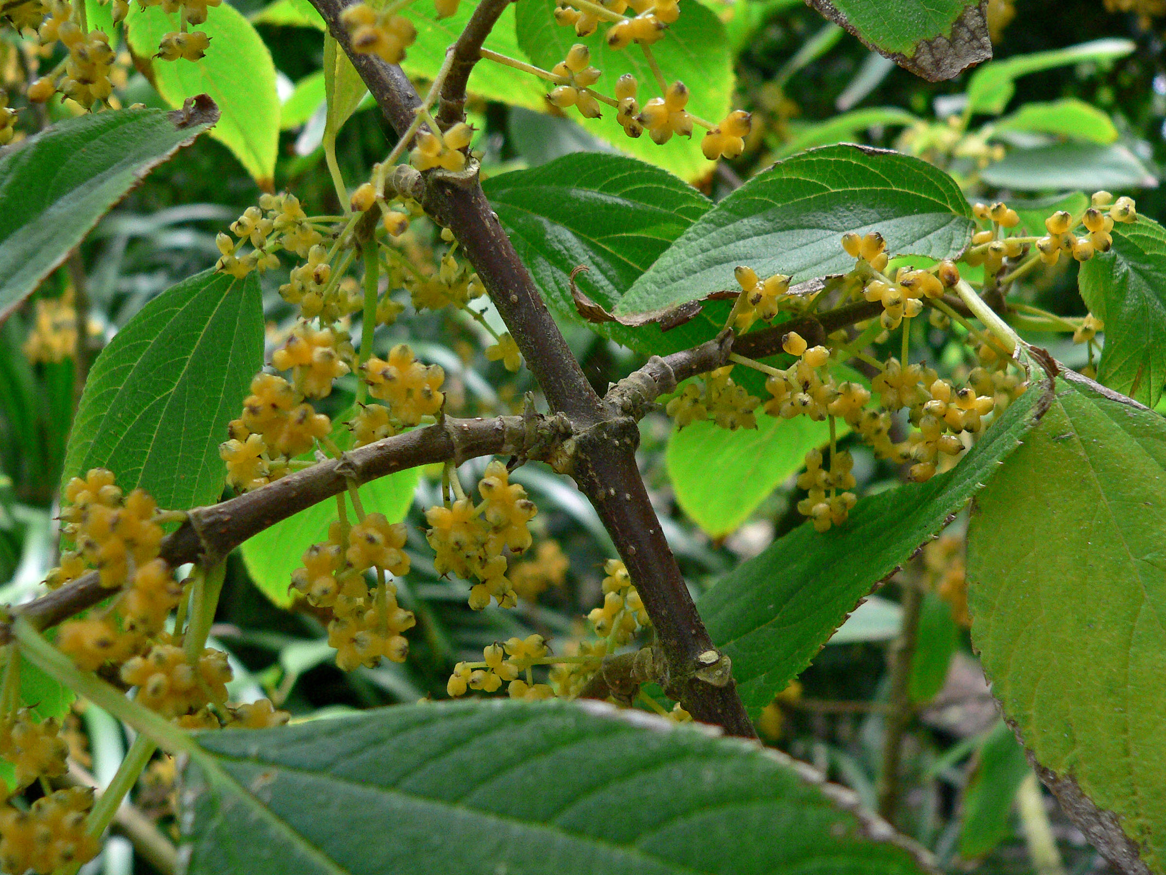 Lozanella enantiophylla at the San Francisco Botanical Garden